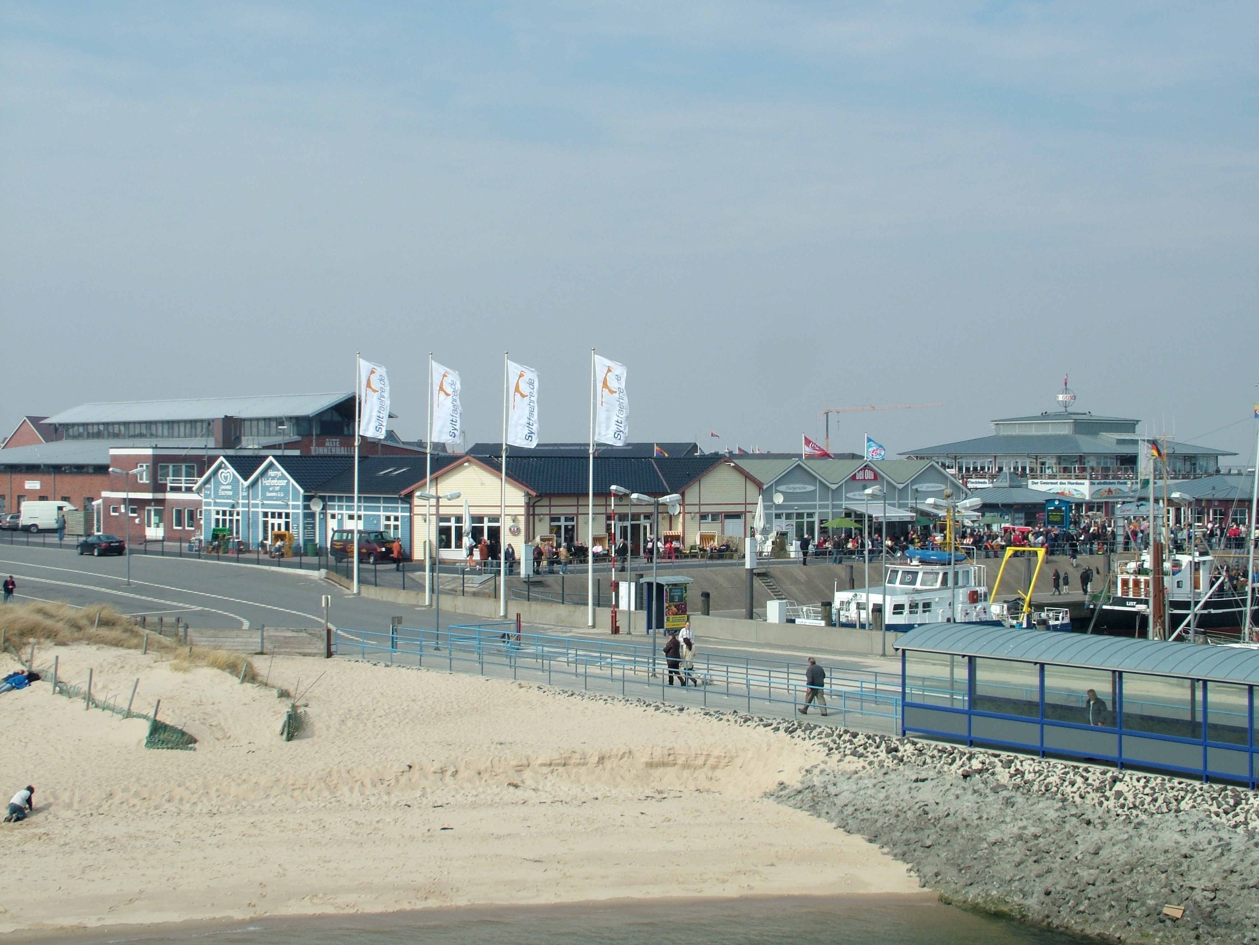 List, Sylt, Schleswig-Holstein, der Fähranleger für die Fähre nach Rømø